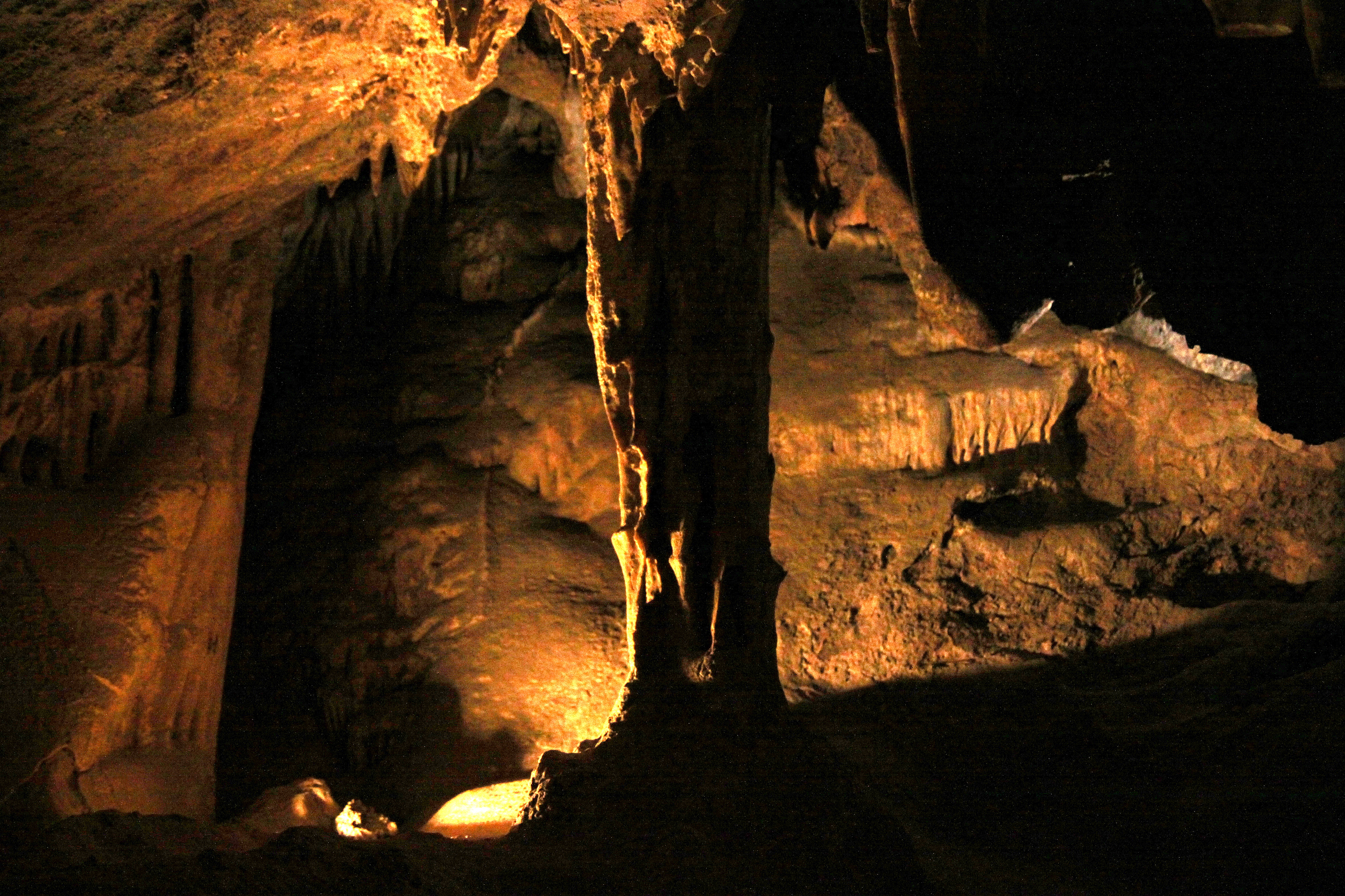 Tucson, Arizona.